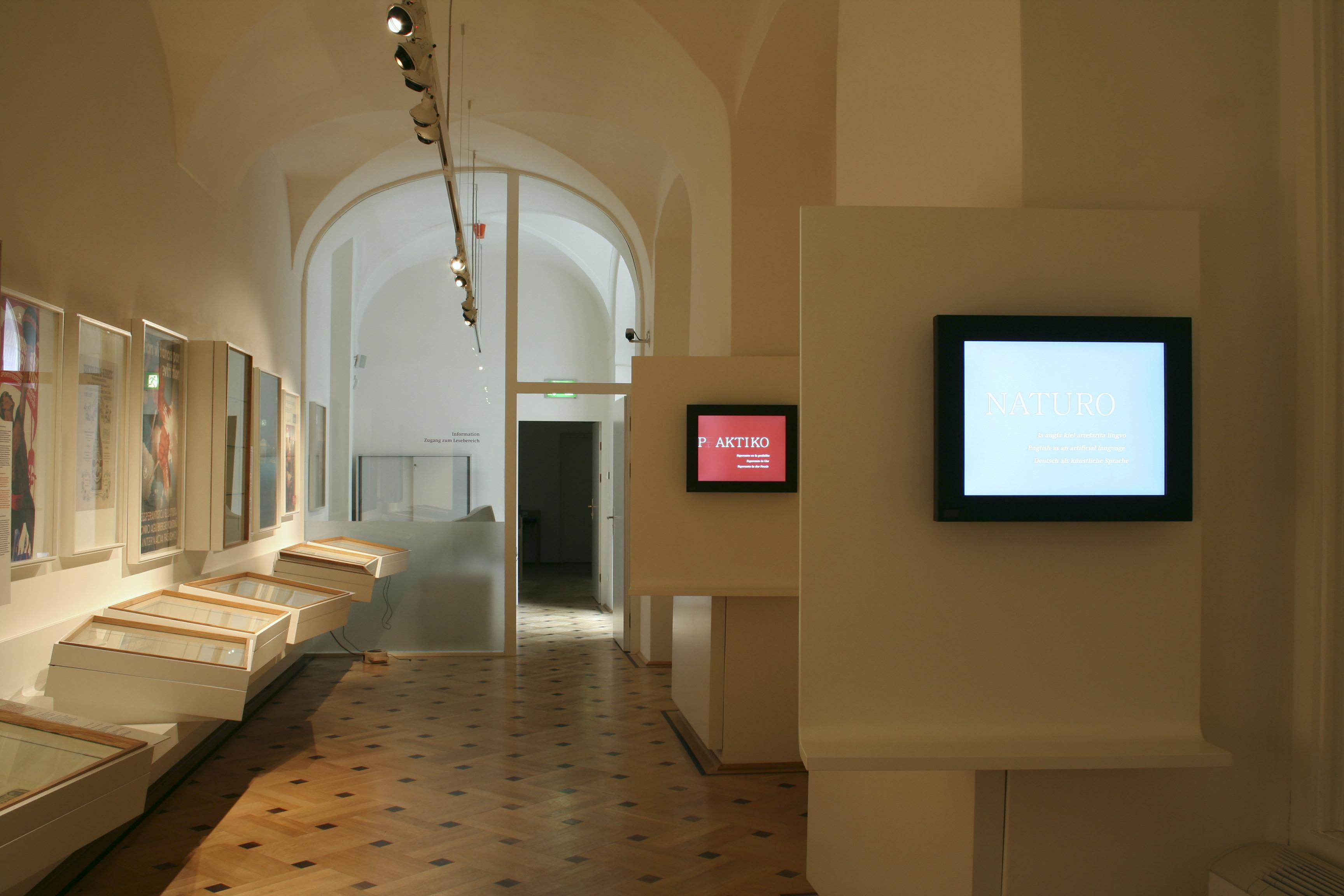 Esperantomuseum, Inner Room (Herrengasse 9, 1010 Vien)